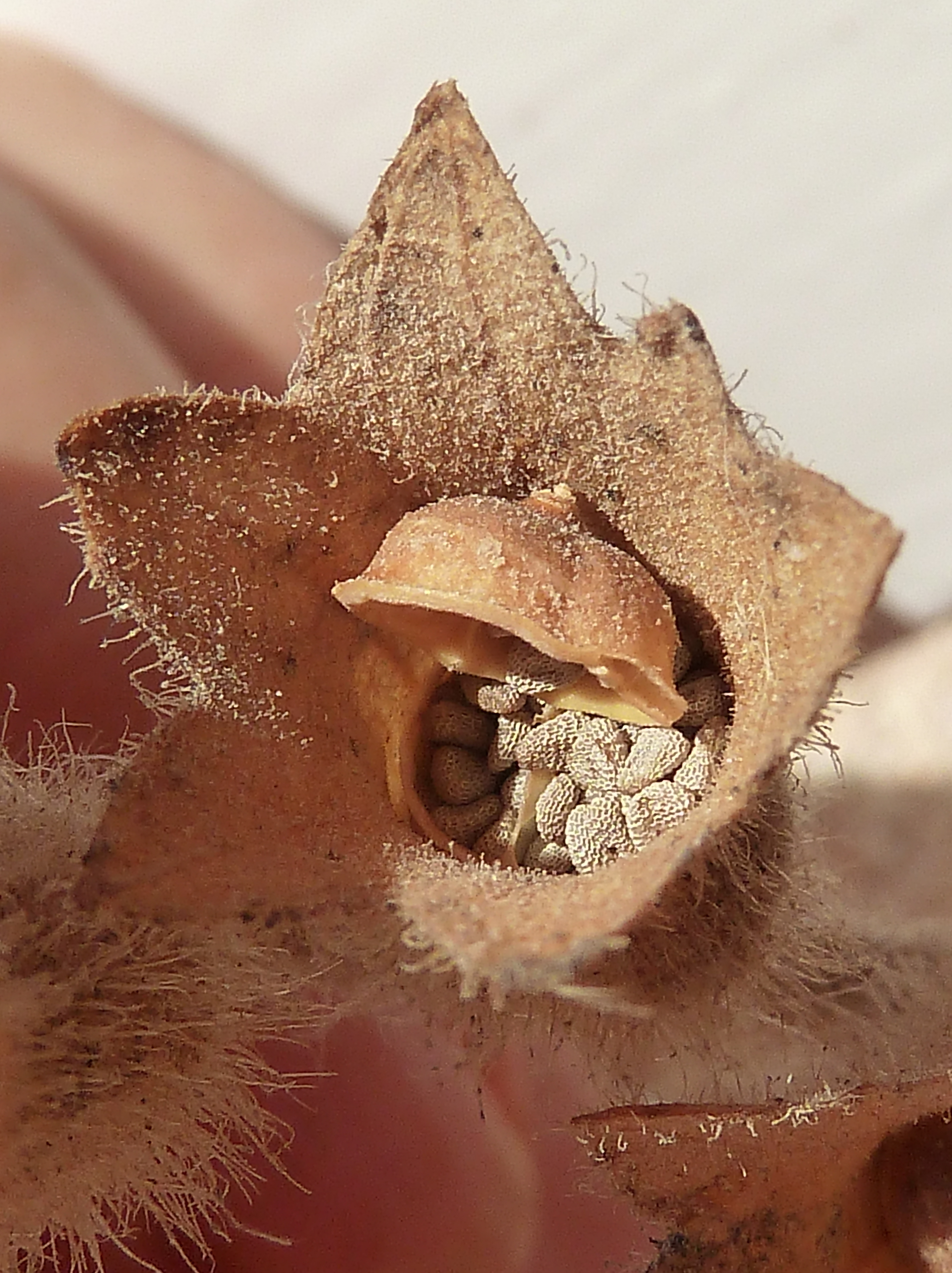 Hyoscyamus albus (Beleño) : pixidio con semillas, in situ en el cáliz - Calle del Puerto de Poniente, Águilas (Murcia, España).